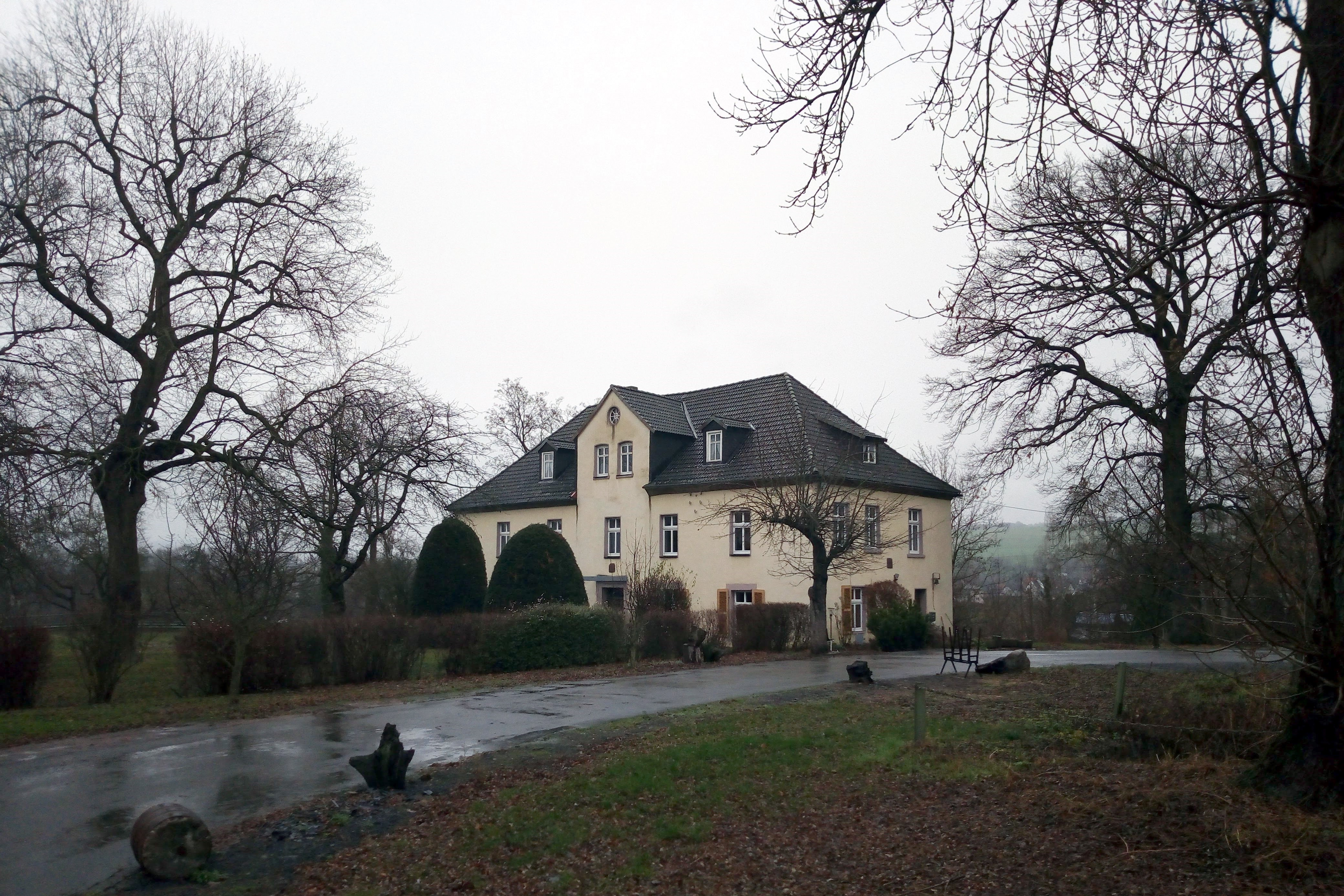 Gut Kemperfeld Wohnhaus 3